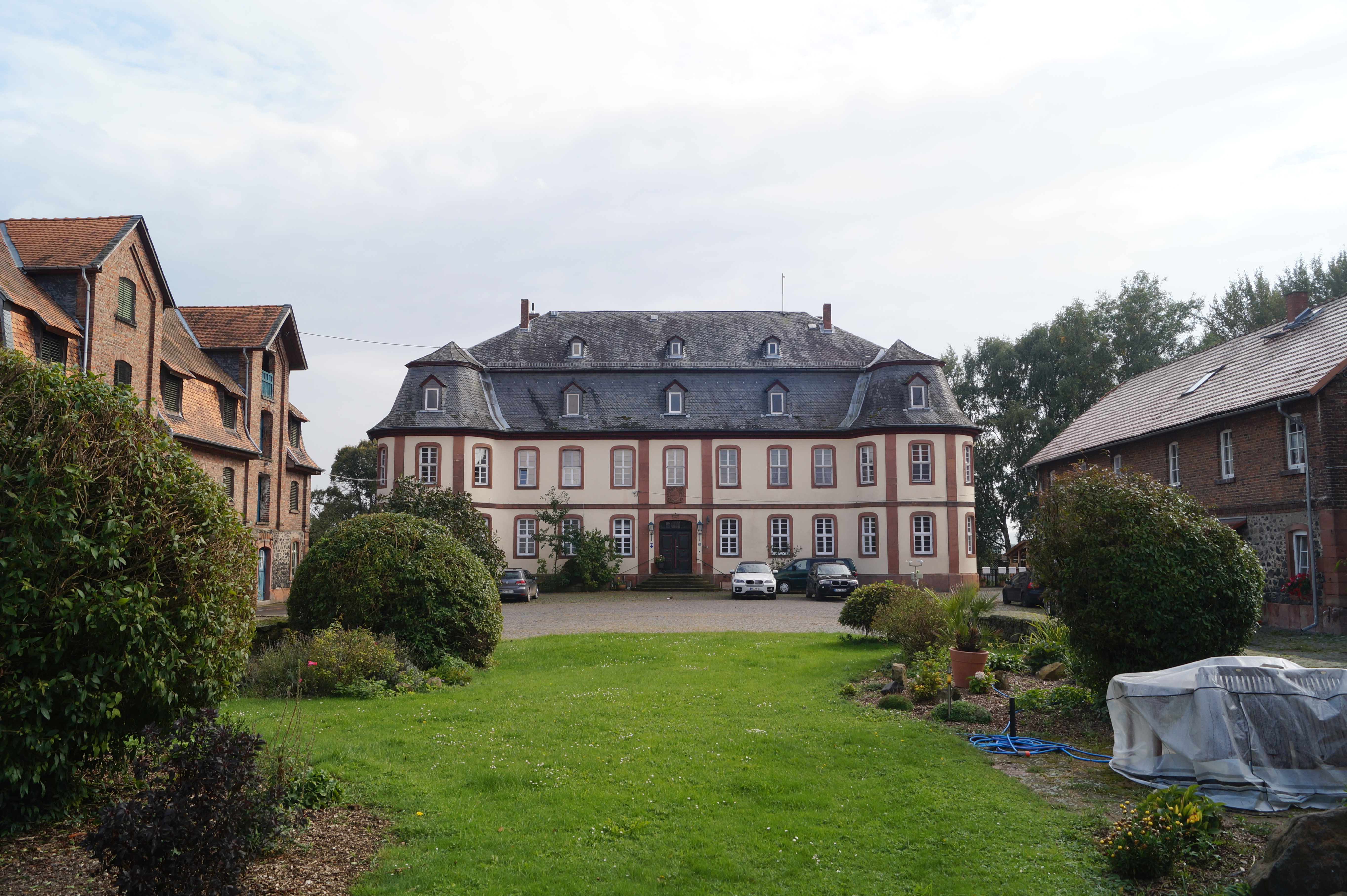 Ansicht der Eingangsseite des barocken Herrenhauses von 1792 der Domäne Wickstadt, Stadt Niddatal, Wetteraukreis in Hessen.